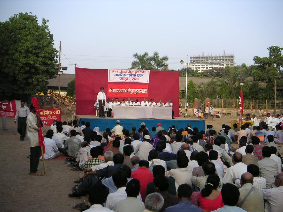 1 maj i Mumbai 2004. Möte arrangerat av Trade Union Joint Action Committee, ett samarbete mellan många olika fackliga organisationer. Foto: Soman